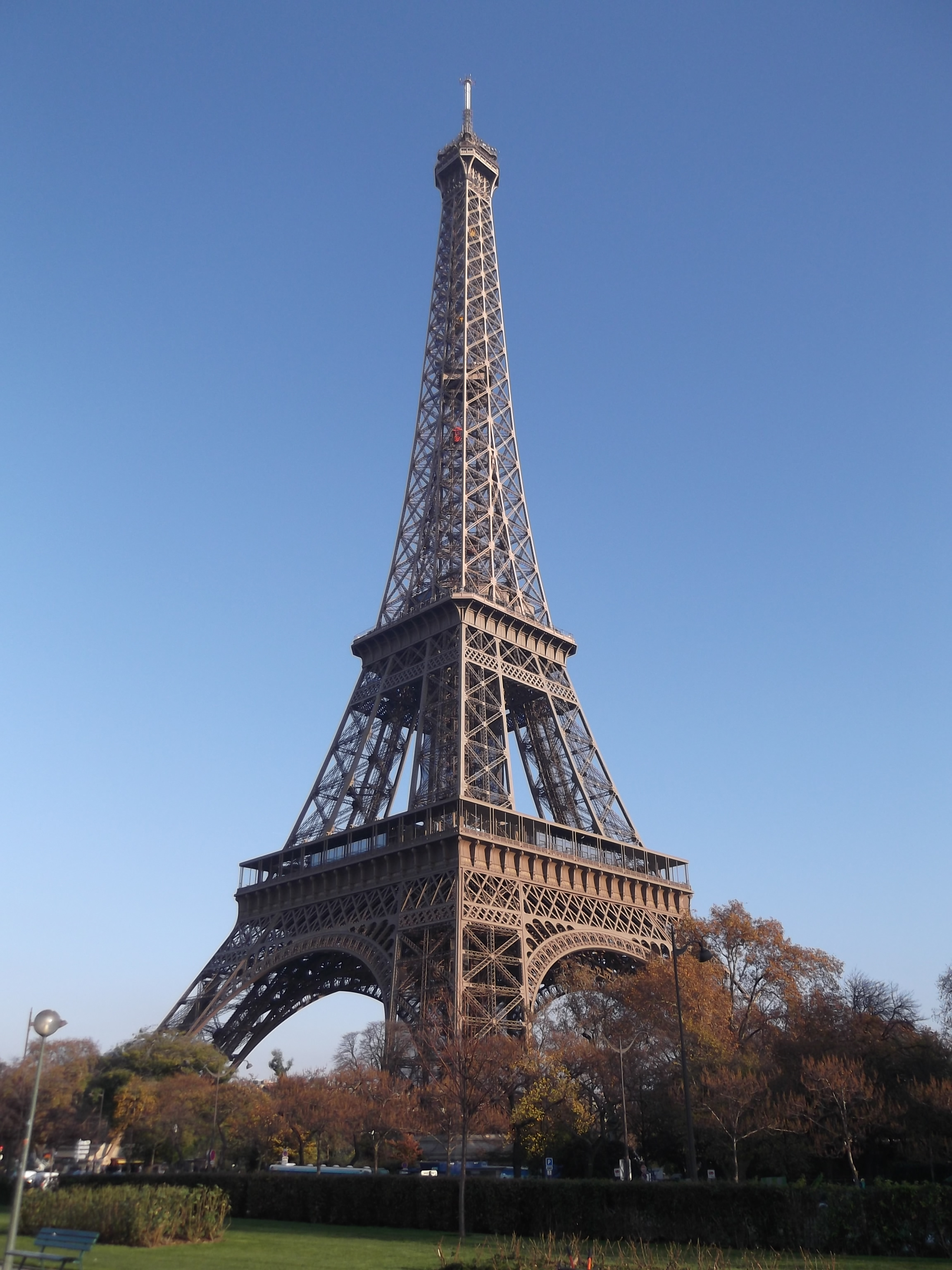 Eiffel Tower